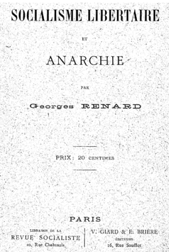 Georges Renard, Socialisme libertaire et anarchie, Revue socialiste (Paris), éditions V. Giard & Brière, 1890